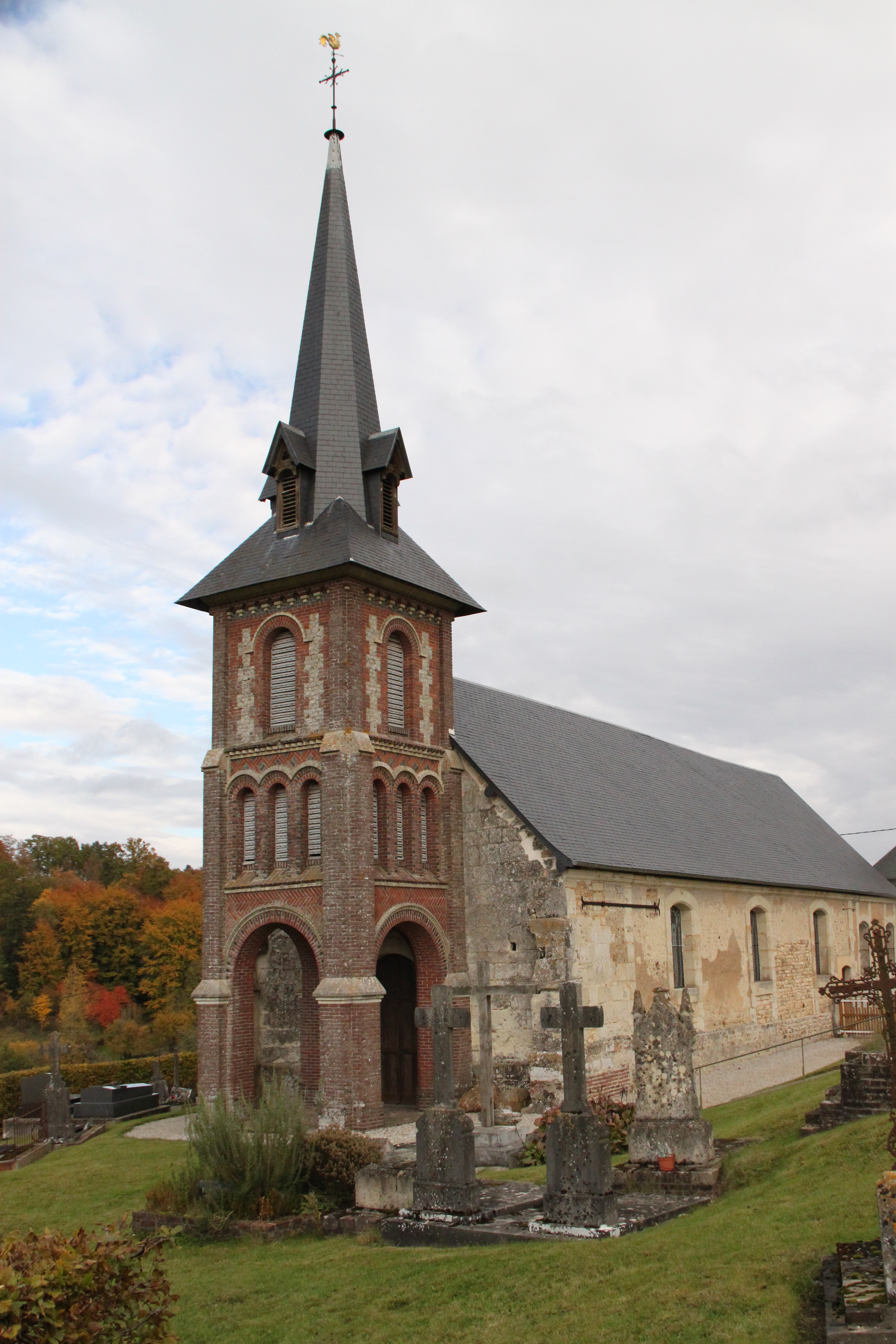 l'église du Mesnil-Germain, Calvados, France.